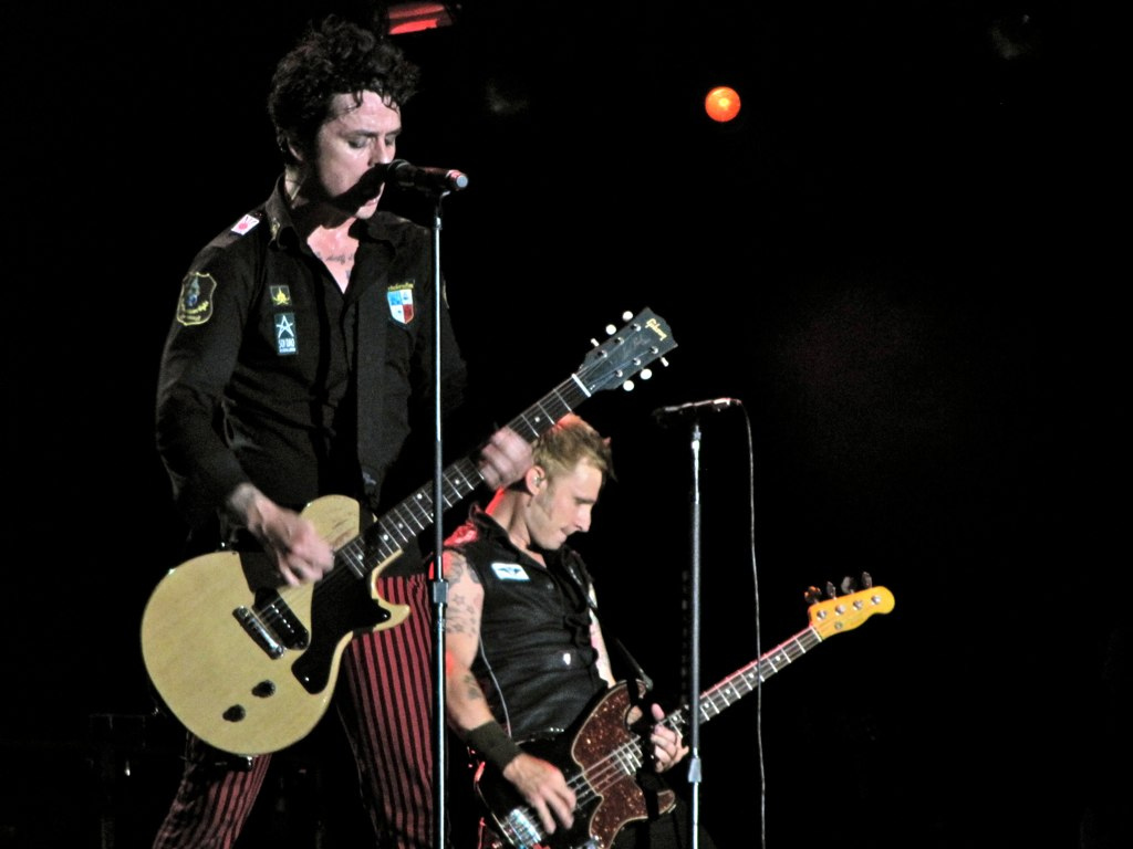 Billie Armstrong y Mike Dirnt de Green Day en octubre de 2010.